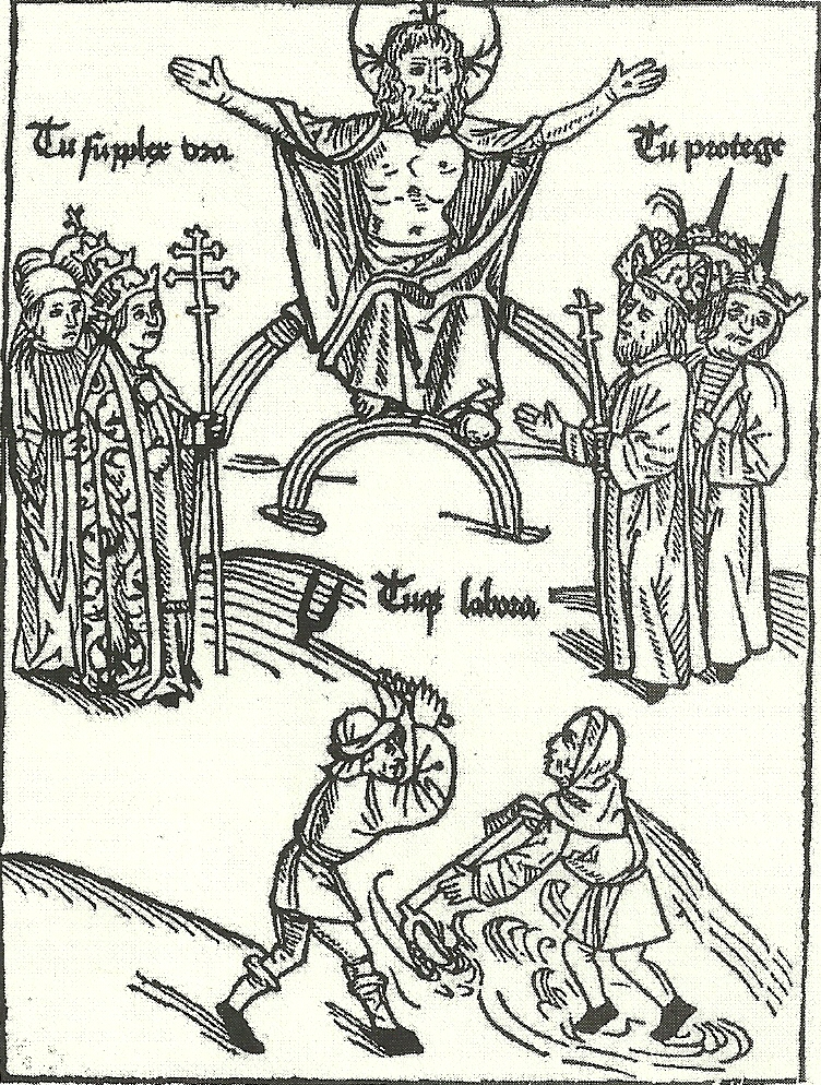 Die mittelalterliche Ständeordnung in der "Pronostacio" des Astrologen Johannes Lichtenberger, 1488